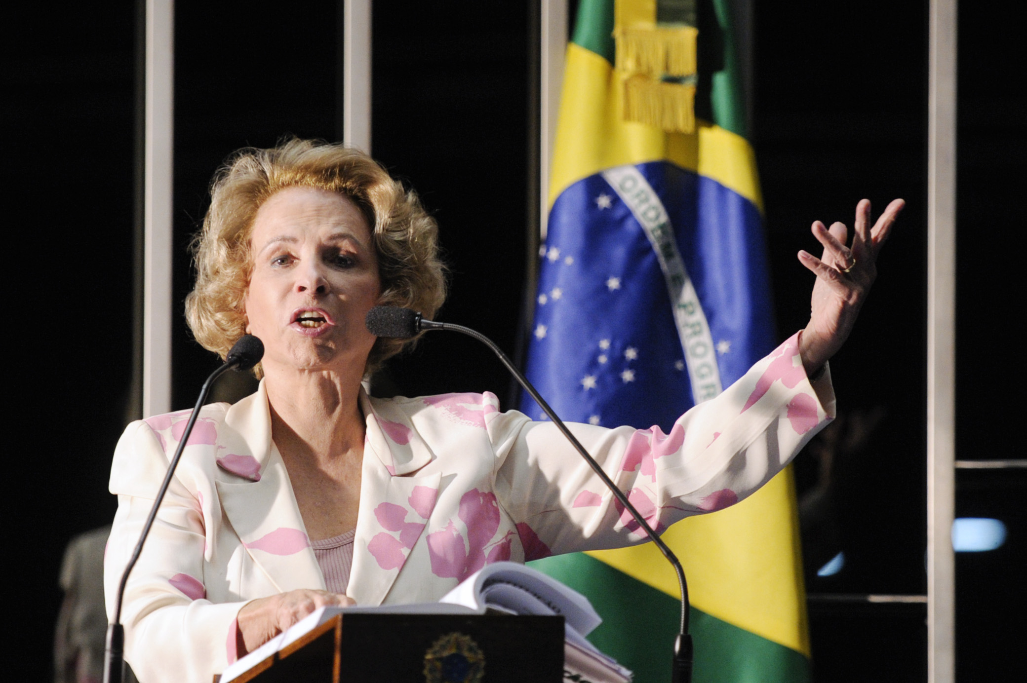 Ex-senadora Eunice Michiles concede entrevista à imprensa nas dependências do Senado Federal. Eunice foi a primeira mulher a ocupar vaga de senadora por processo eletivo no Brasil. Foto: Edilson Rodrigues/Agência Senado